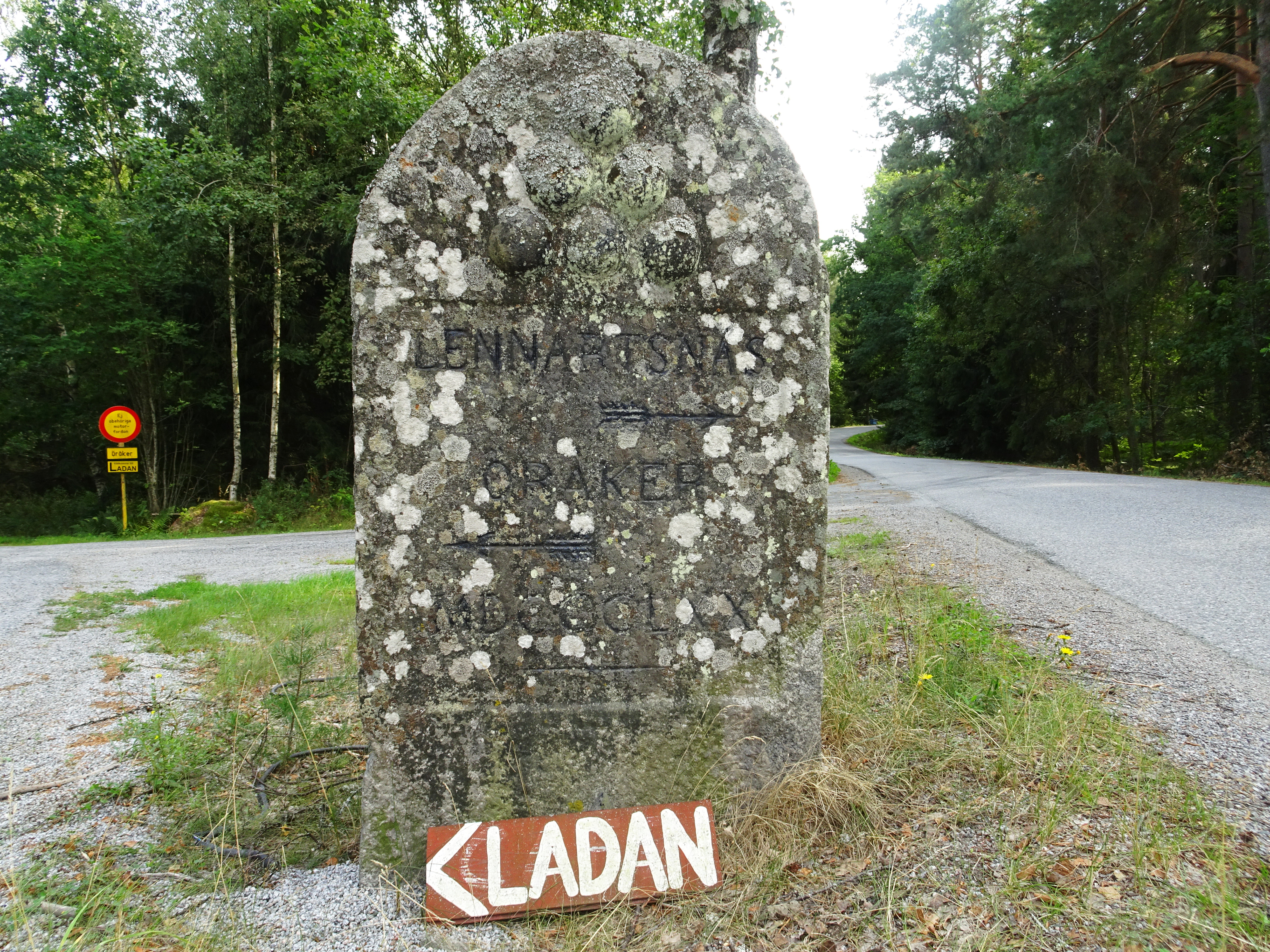 Vägmärke till Lennartsnäs respektive Öråker, av gråsten, 1,7 m h, 0,9 m br (NÖ-SV) och 0,55 m tj. Inskrift mot NV med 0,07 m h bokstäver: "Lennartsnäs" och "Öråker" samt årtal "MDCCCLXX" (1870). Över texten är en utsmyckning av 6 halvklot. RAÄ-nummer Kungsängen 51:1